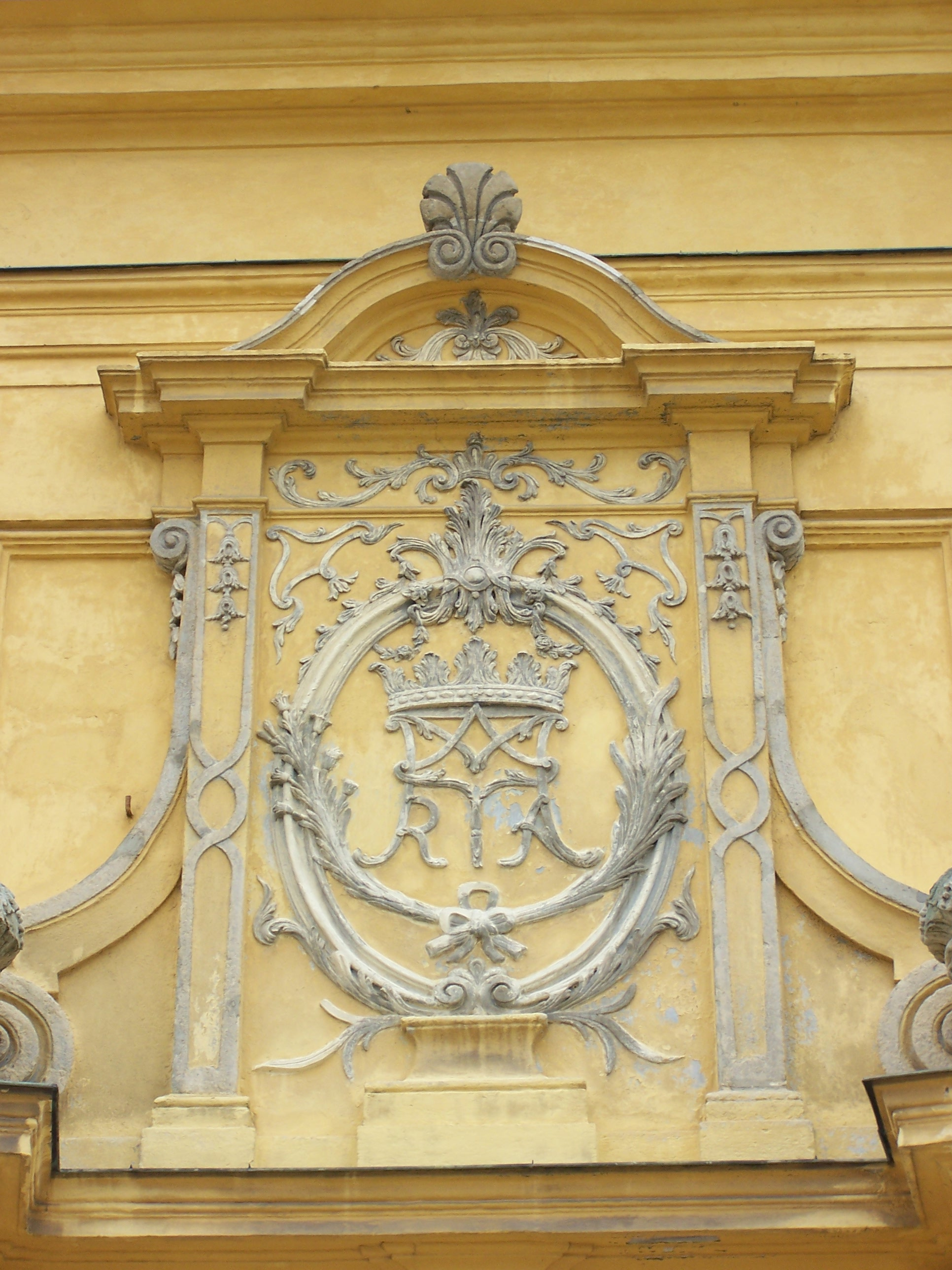 Cisztercita templom (Zirc, Köztársaság útja) This is a photo of a monument in Hungary. Identifier: 10747